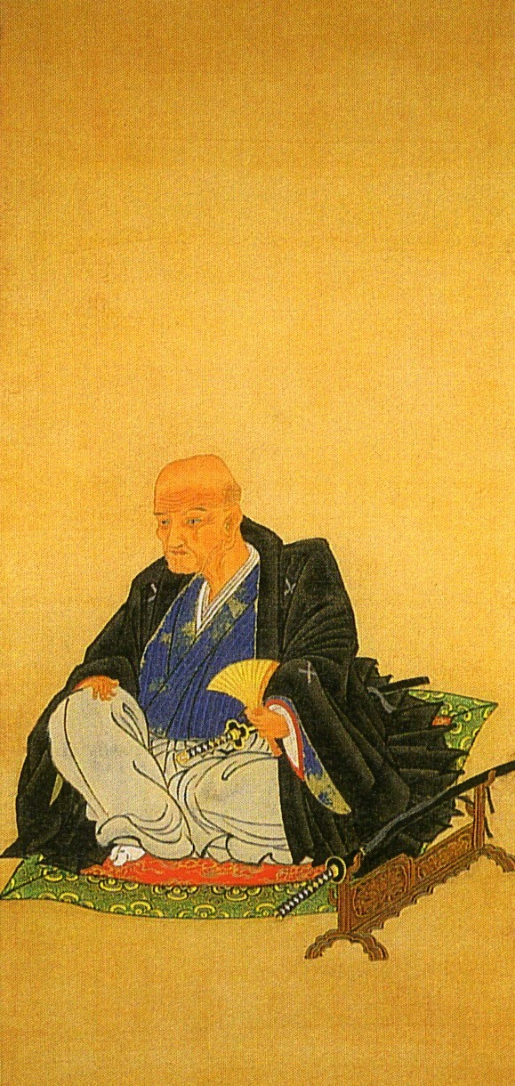 丹羽長富の肖像画(市指定文化財)。